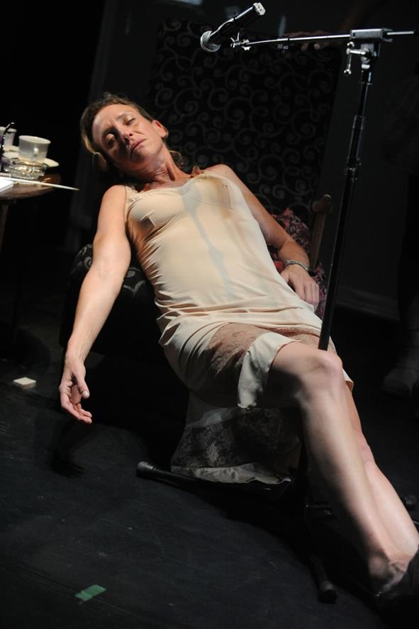 לני שחף מתוך רוחות מוראנוב